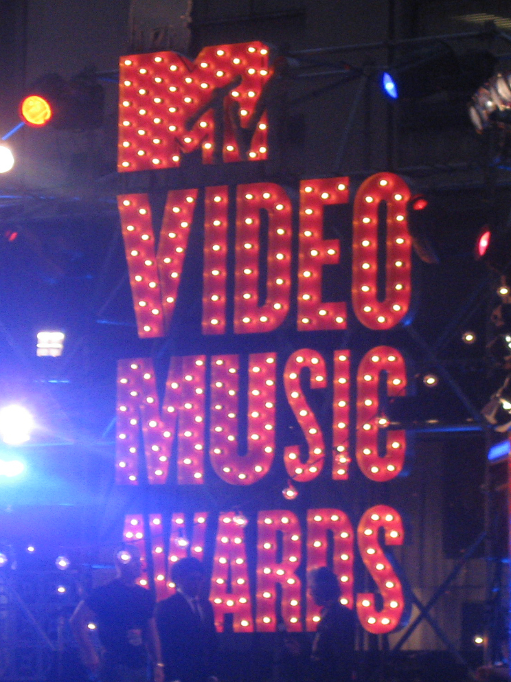 El cartel de los premios MTV Video Music Awards en el exterior del Radio City Music Hall de Nueva York. 13 de septiembre de 2009.